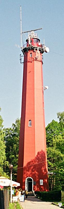 Latarnia morska na Helu